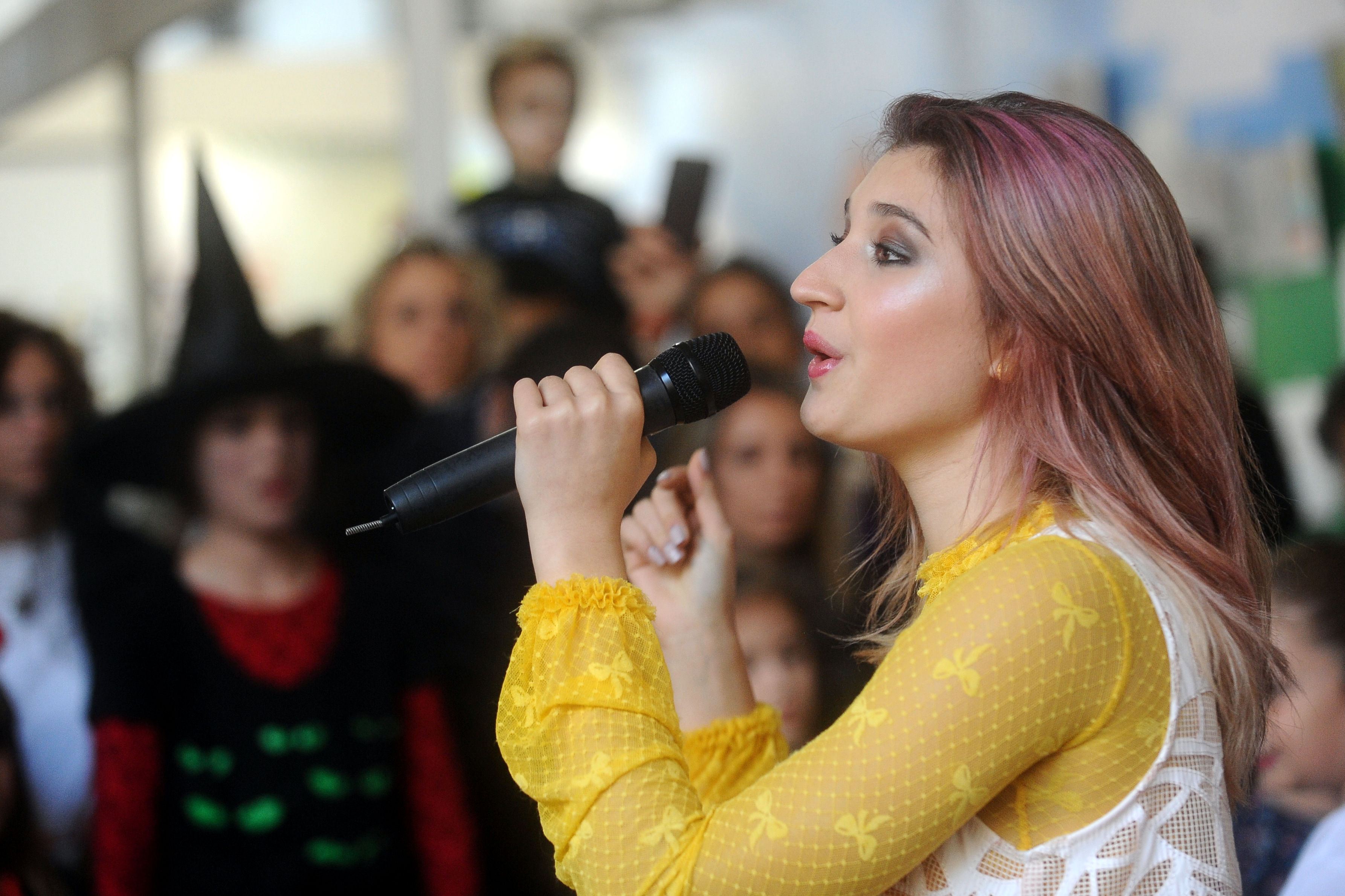 Chiara Francia a Lucca Comics & Games. Lucca Junior.